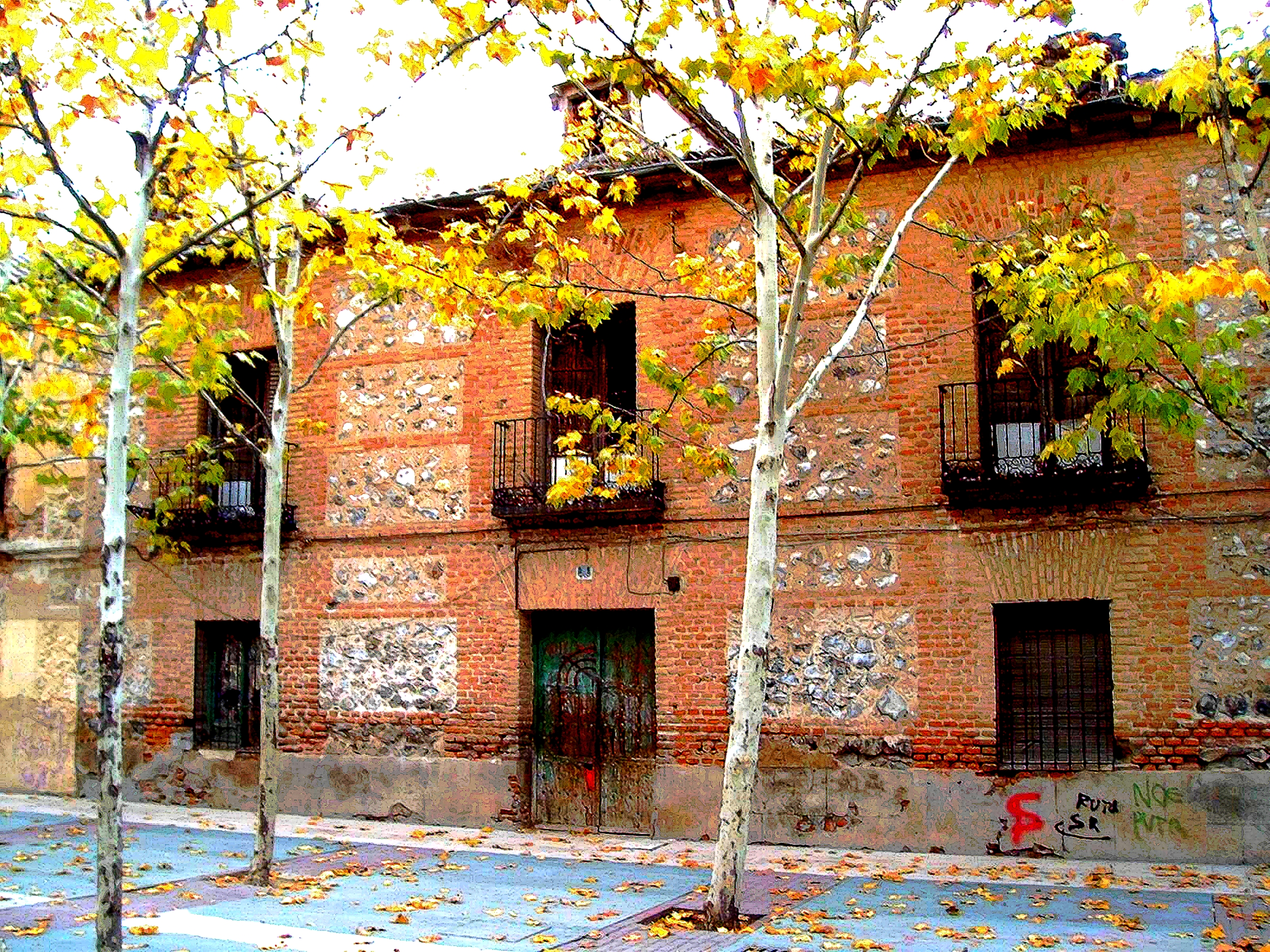 Fotografía del estado previo a la restauración de la vivienda nº 16 de La Plaza de España, hoy parte del MUSEO DE LA CIUDAD, que mejor mantenía la composición original de los edificios construidos en el siglo XVIII para vivienda de los trabajadores de la Real Fábrica de Paños.